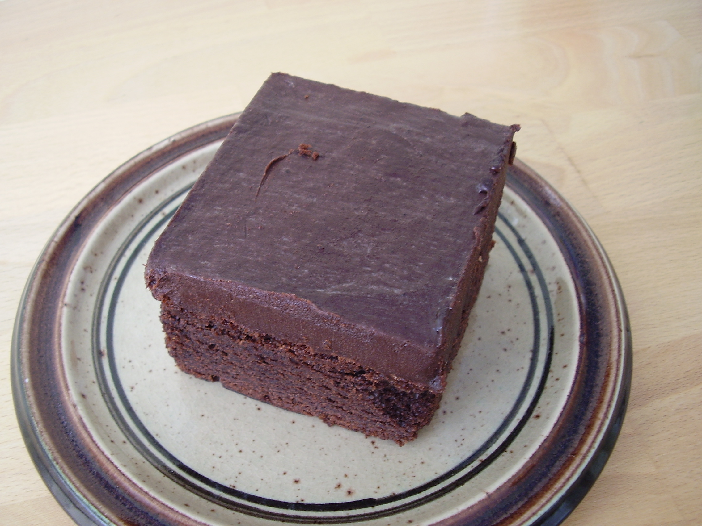 Schokoladenkuchen von McCafe (Mcdonalds) - 2,25 EURO (2008); chocolate cake - McCafe, Germany